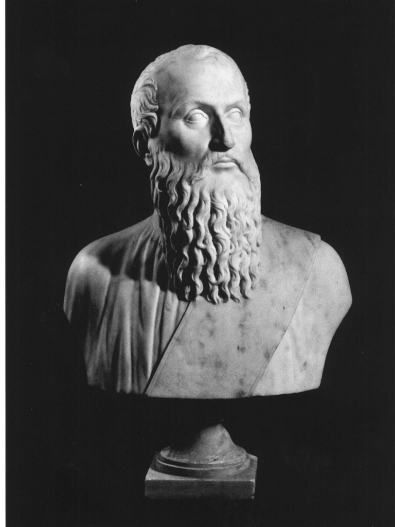 Carlo Zeno, opera di Angelo Giordani precedente al 1847. Il busto fa parte del Panteon Veneto, conservato presso Palazzo Loredan di Campo Santo Stefano a Venezia.